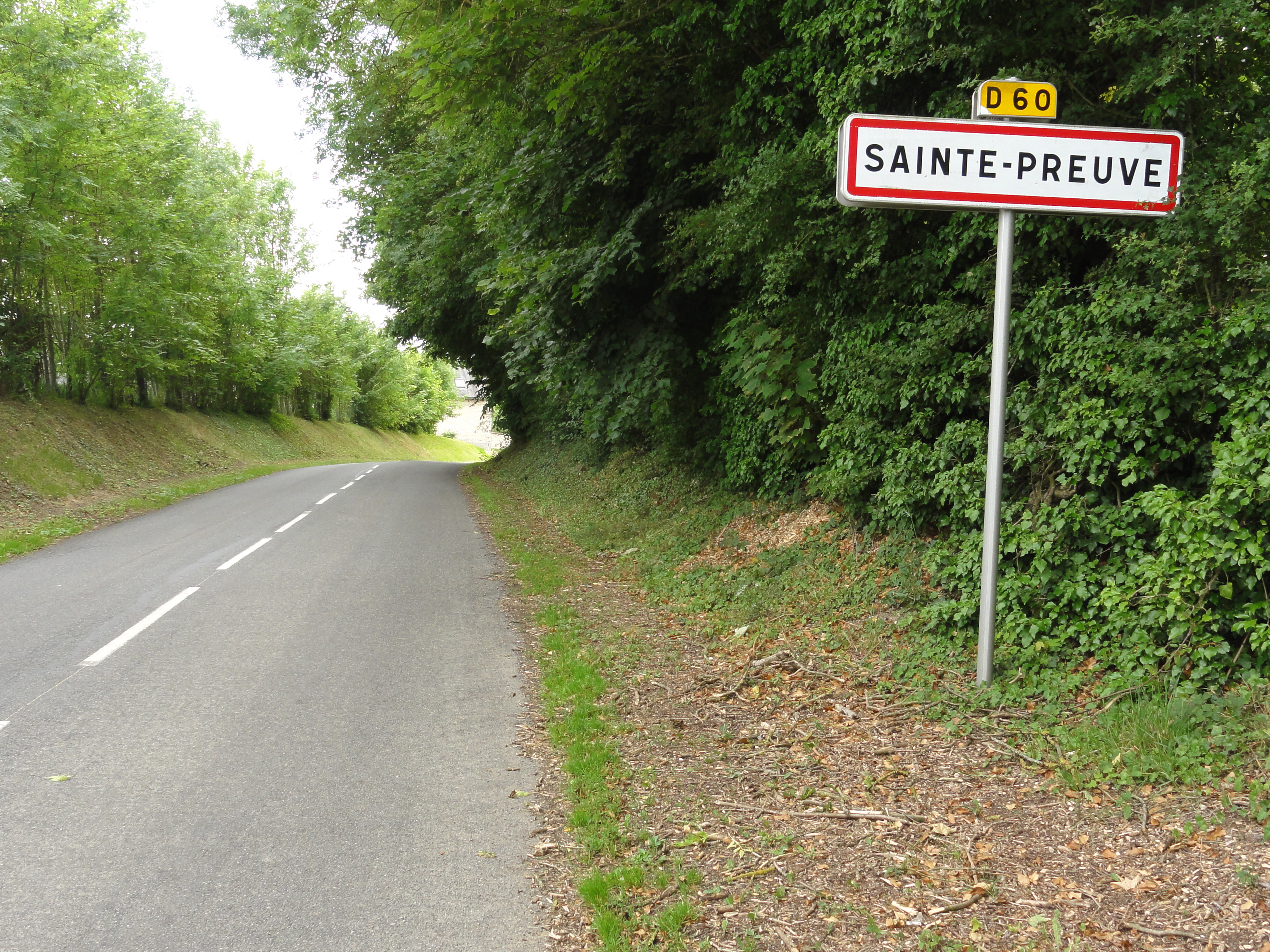 Sainte-Preuve (Aisne) city limit sign